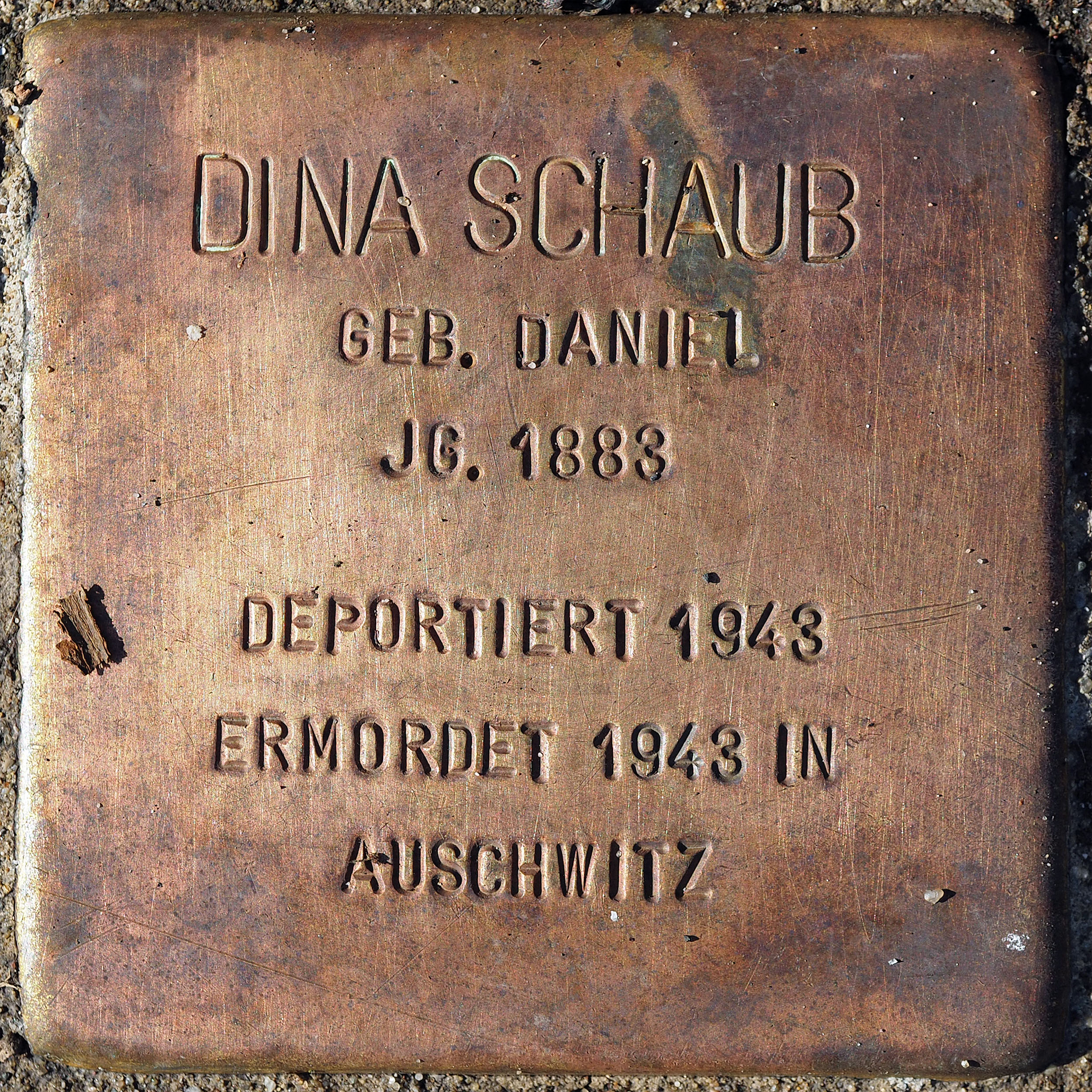 Stolperstein DU: Schaub, Dina